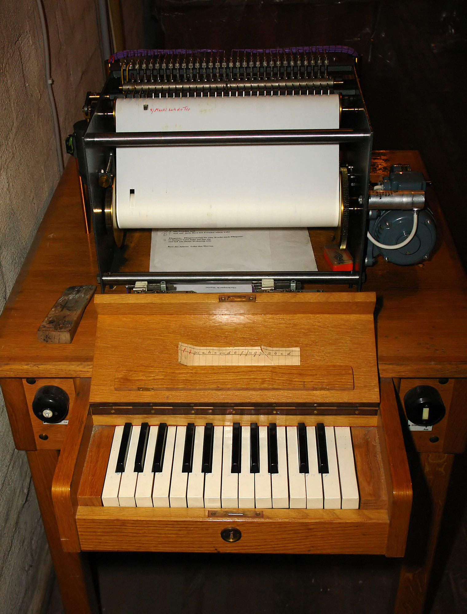 St.Martini-Kirche in Bremen. Spieltisch mit Lochwalze für das Carillon